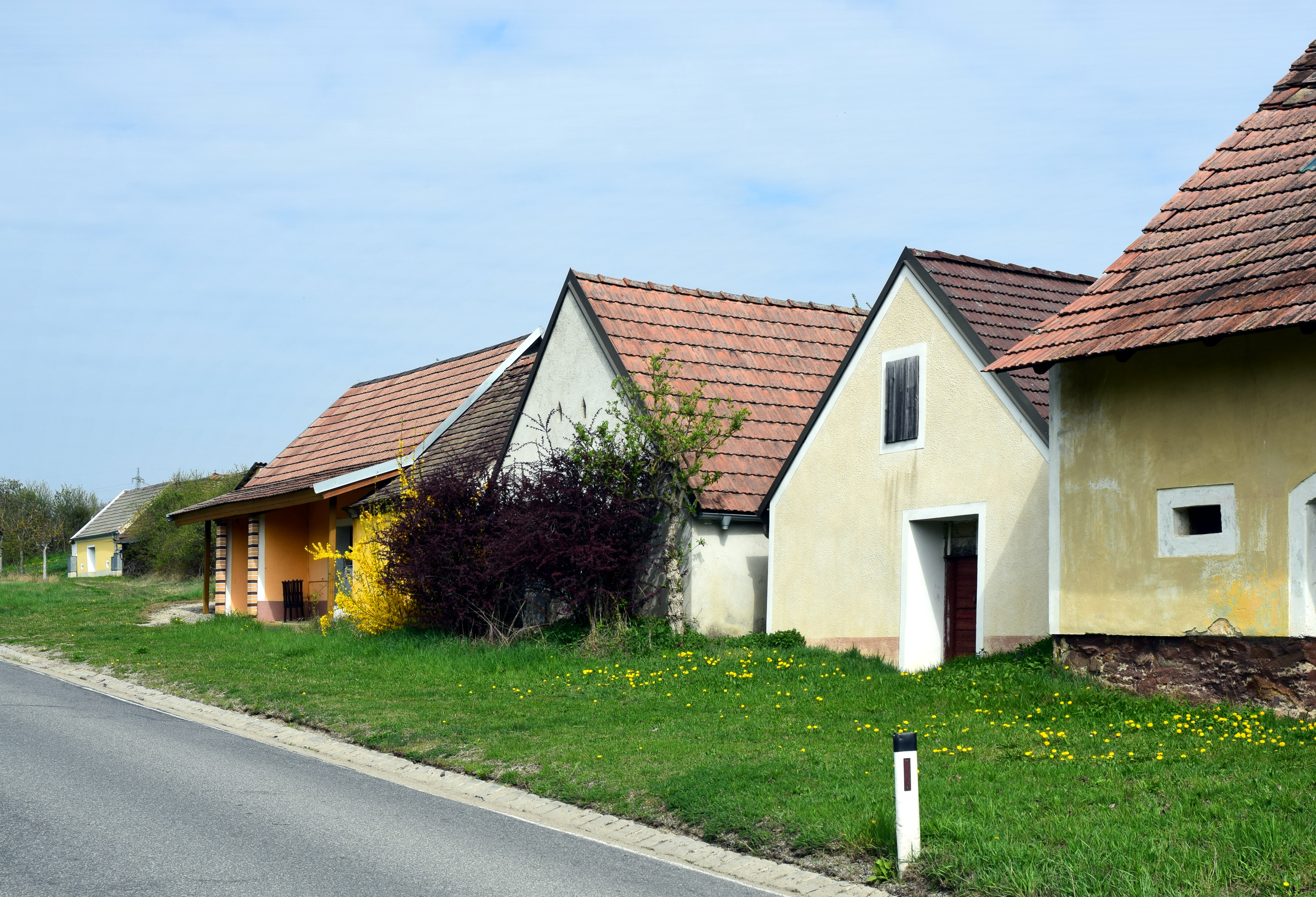 Kellergasse „Landesstraße“ in der KG Engelsdorf in Eggenburg